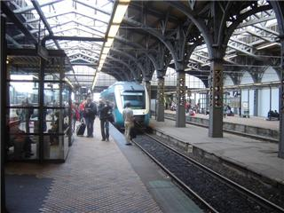 Århus hovedbanegård